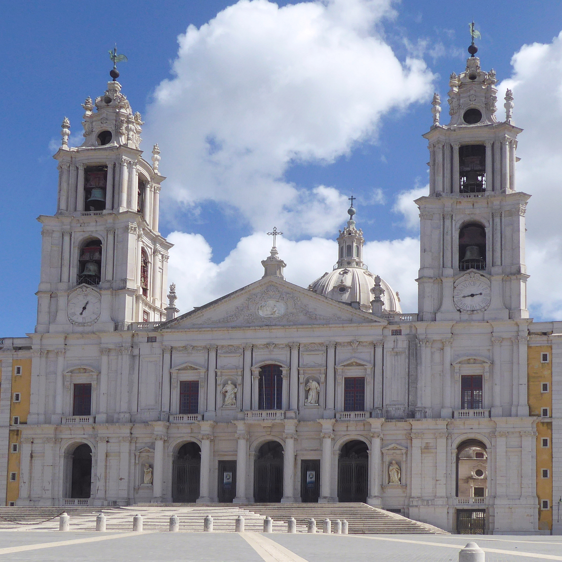 Basilika des Palácio Nacional de Mafra mit Glockentürmen Portikus und Kuppel Foto 2016 Wolfgang Pehlemann DSC00835